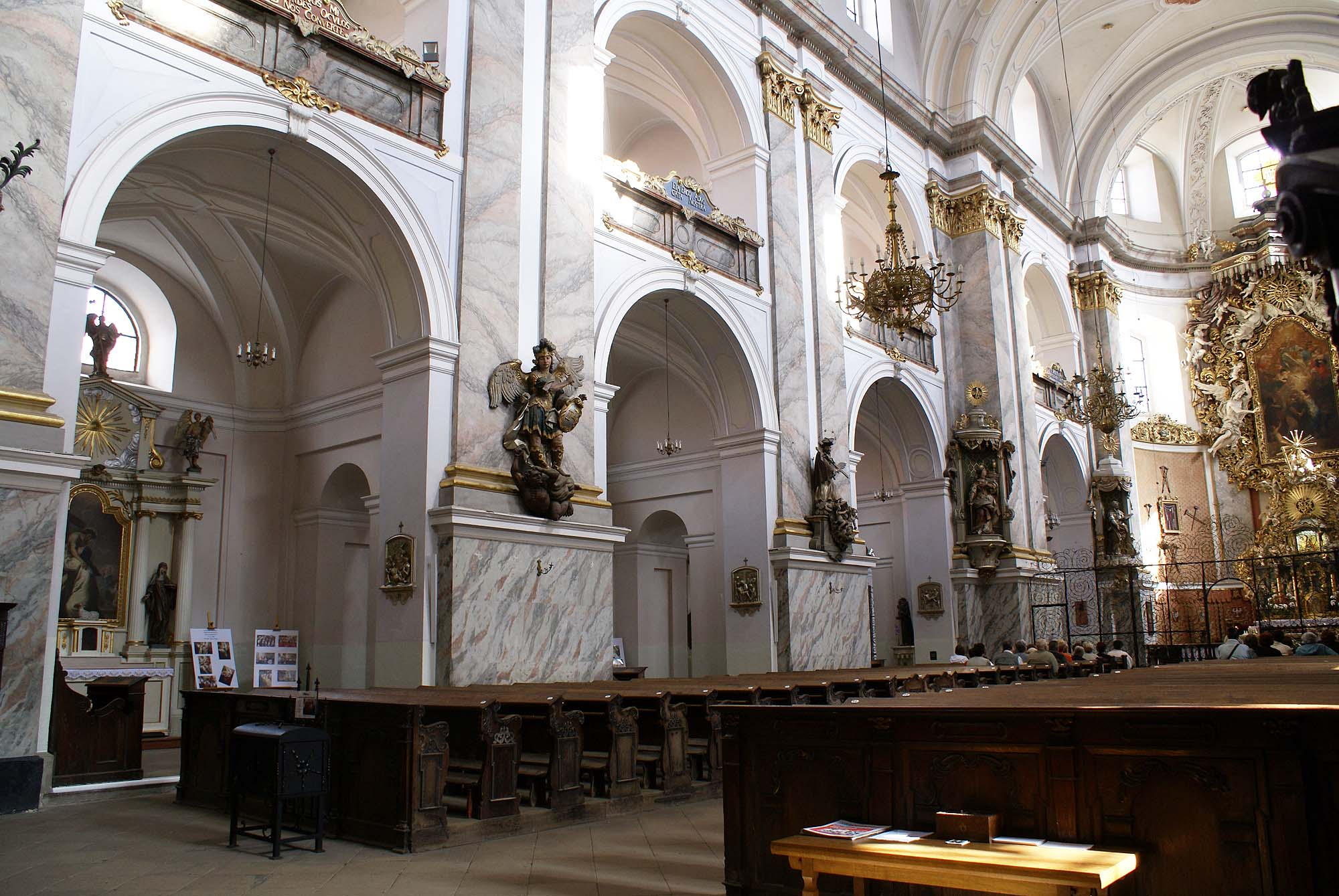 Bardo, kościół par. p.w. Nawiedzenia NMP, 1686-1704